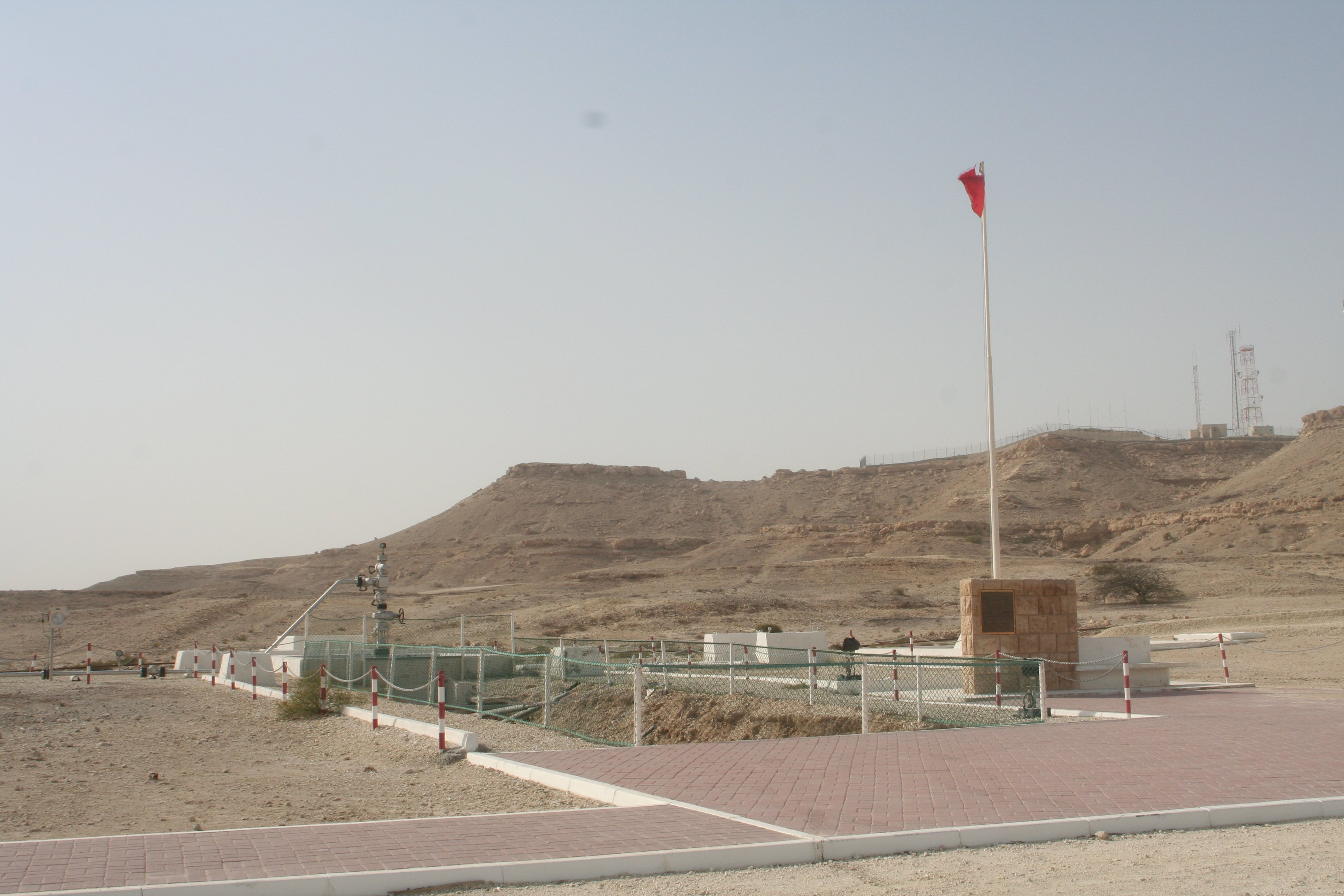 First oil well in Bahrain